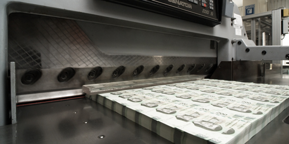 Fabriación de Billete Guillotina